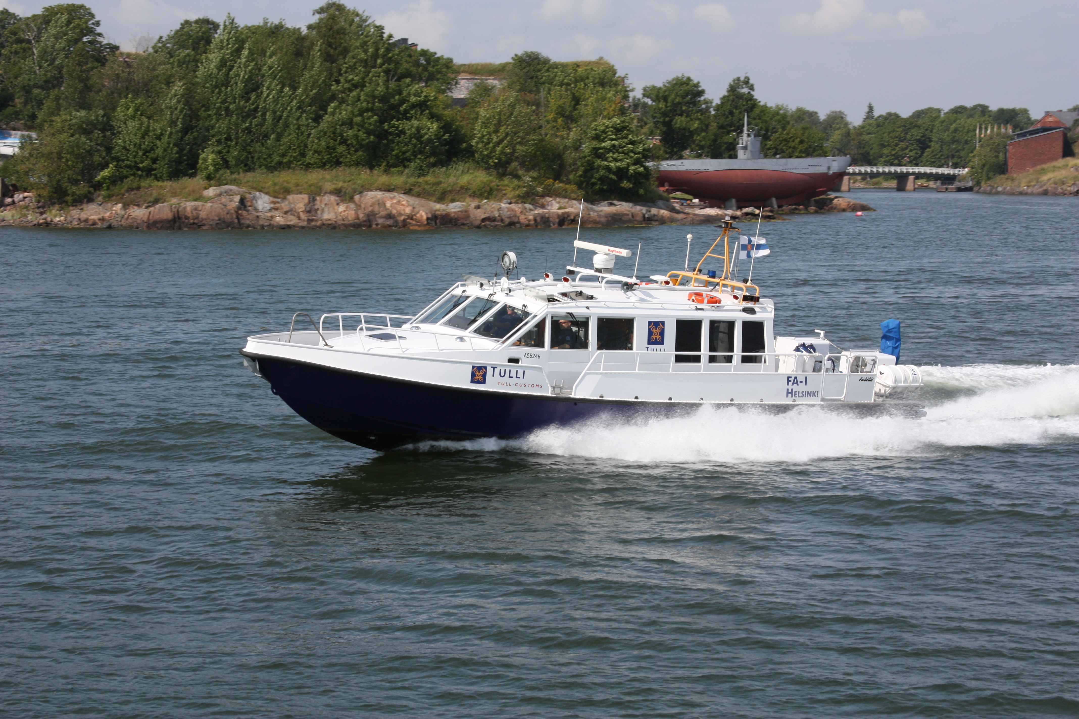 tourist pictures of Helsinki